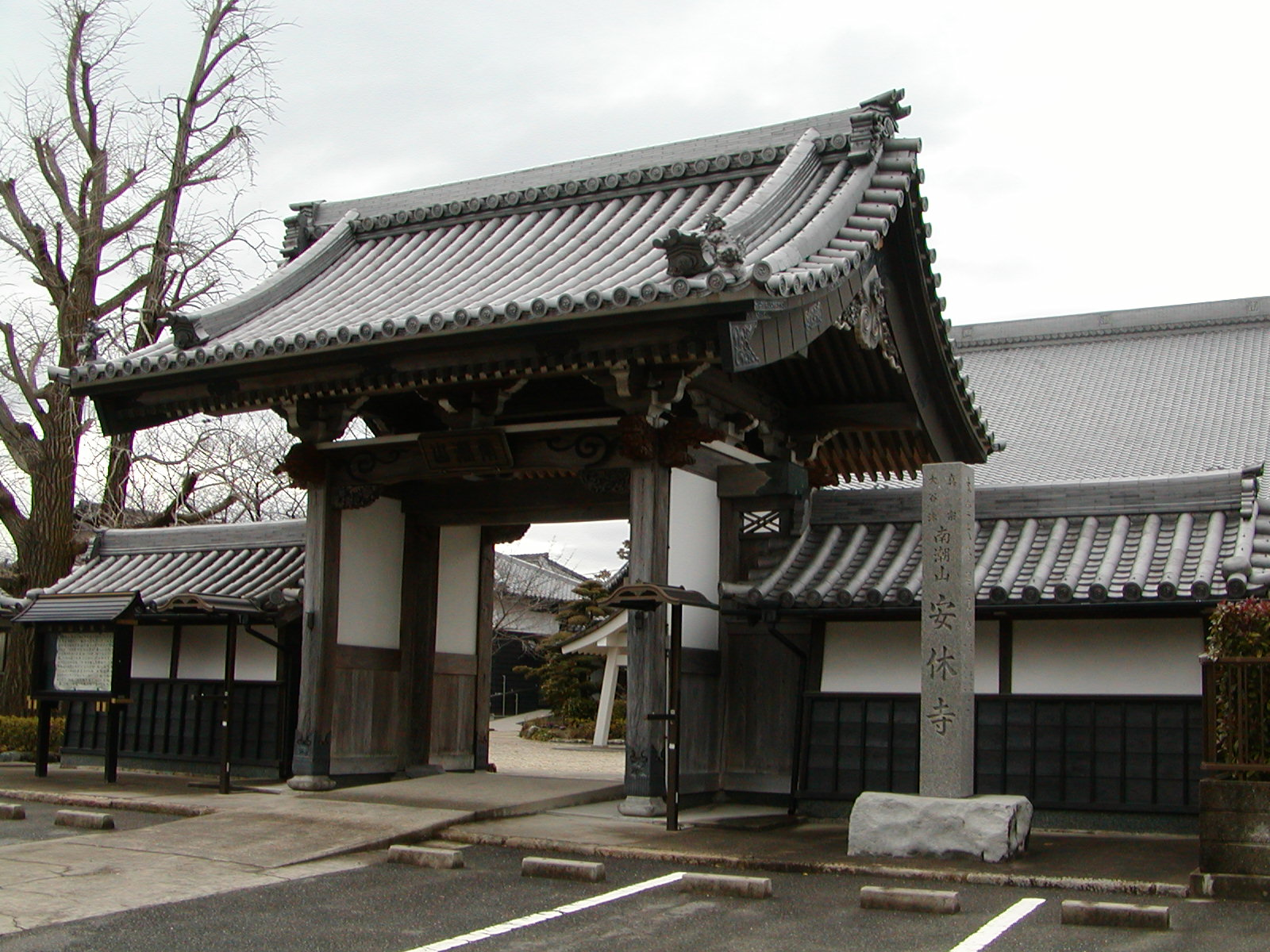 愛知県西尾市一色町安休寺